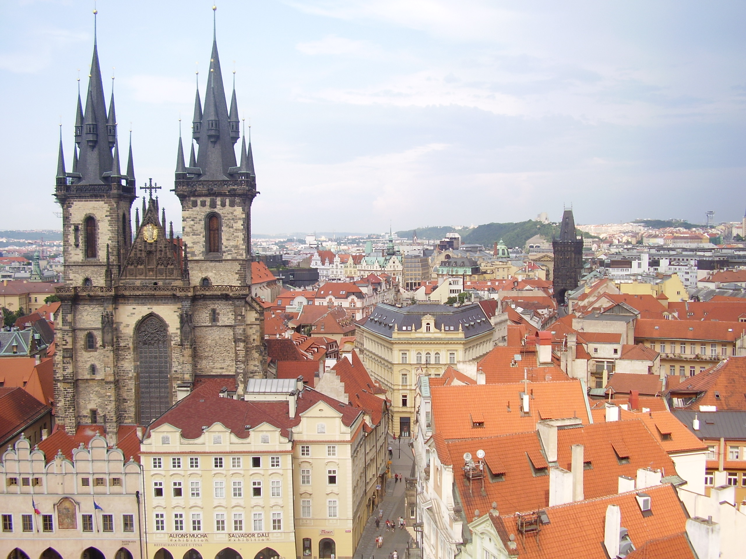 Týn előtt Szűz Mária-templom.